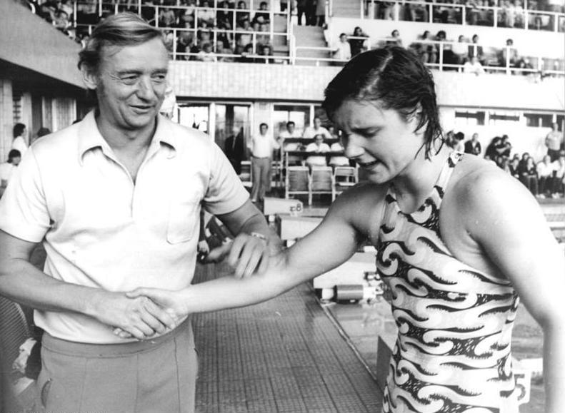 Rosemarie Gabriel ADN-ZB Mittelstädt 5-6-76 Berlin: 27. Meisterschaften der DDR im Sportschwimmen (5.Tag)-Überglücklich empfing Trainer Rolf Gläser seinen Schützling Rosemarie Gabriel (SC Dynamo Berlin). Im Entscheidungslauf über 200 m Schmetterling blieben die Uhren für sie erneut bei der Weltrekordzeit von 2:11,22 min stehen, nachdem sie schon im Vorlauf ihre alte Rekordmarke auf 2:12,84 min verbessert hatte.